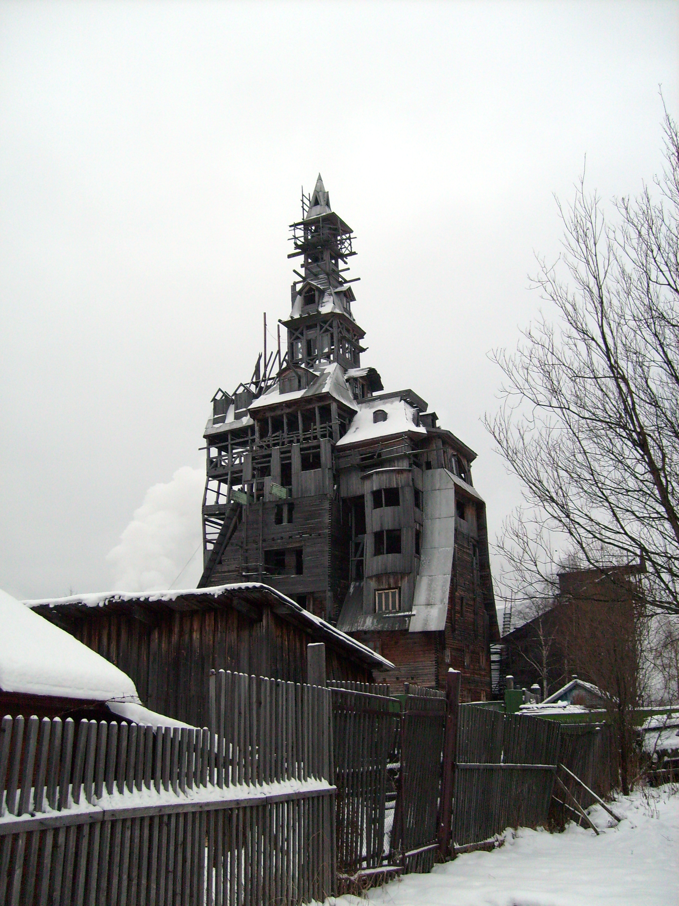 13-этажный деревянный дом Николая Сутягина в Архангельске